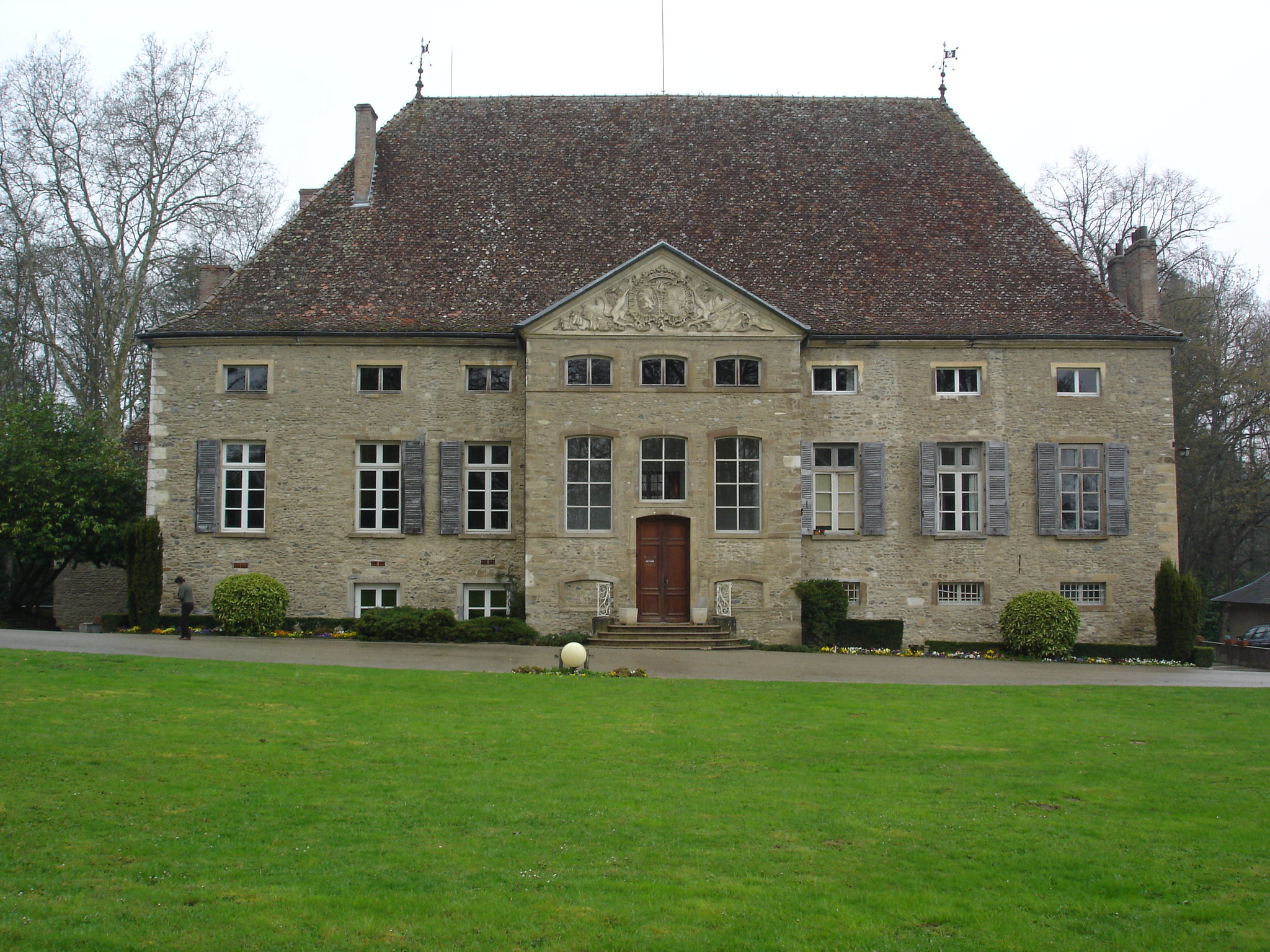 Dolomieu (Isère, France) - Château du XVIIe siècle. La façade est caractérisée par un avant-corps d'allure assez massive (puis qu'occupant presque le tiers de la longueur totale) et surmonté d'un fronton richement décoré. le tout au milieu d'un immense parc paysagé avec des arbres de toute beautés. Il sert de lieu de séjours pour des associations en tout genres